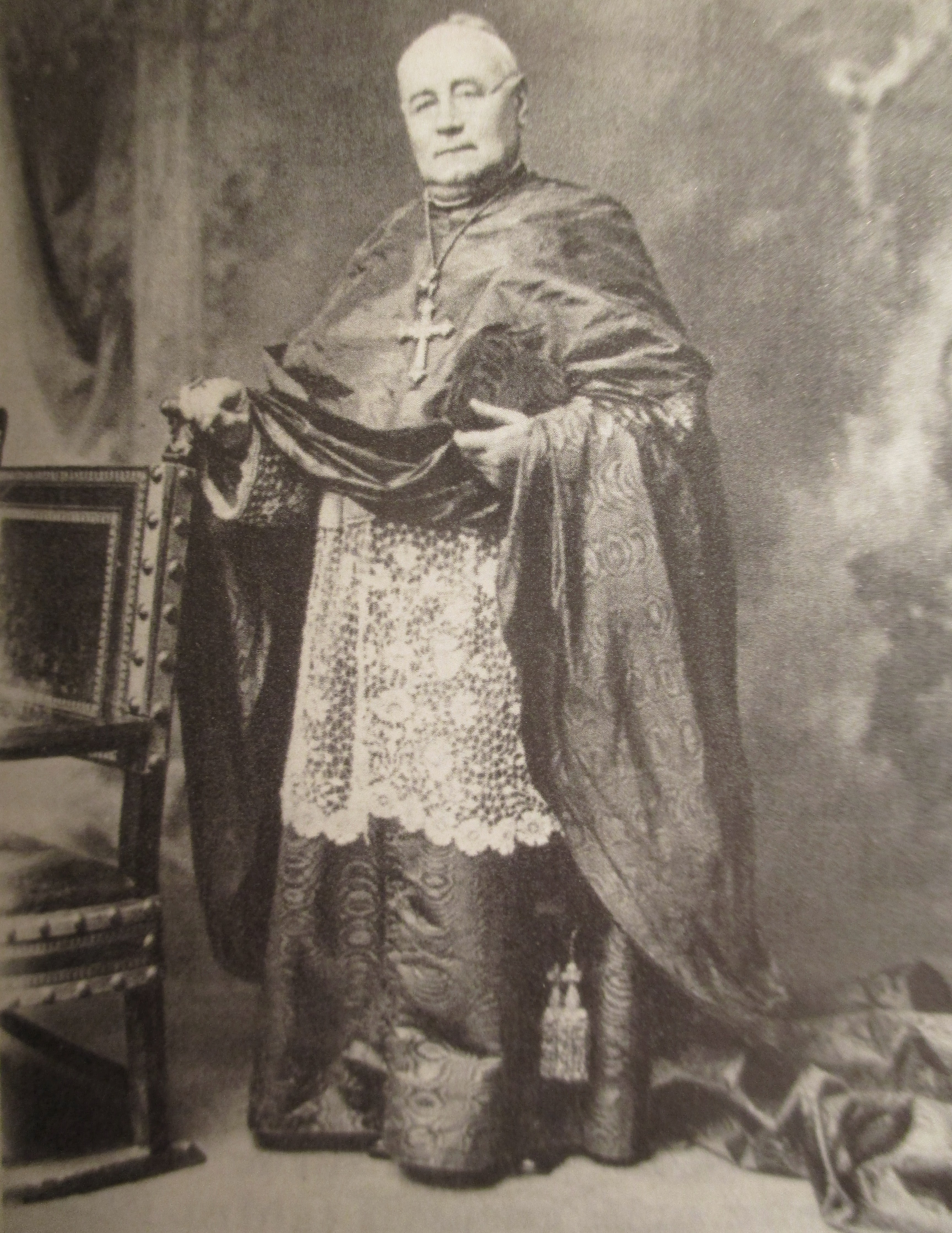 Le cardinal Sevin,primat des Gaules et archevêque de Lyon (1852-1916).